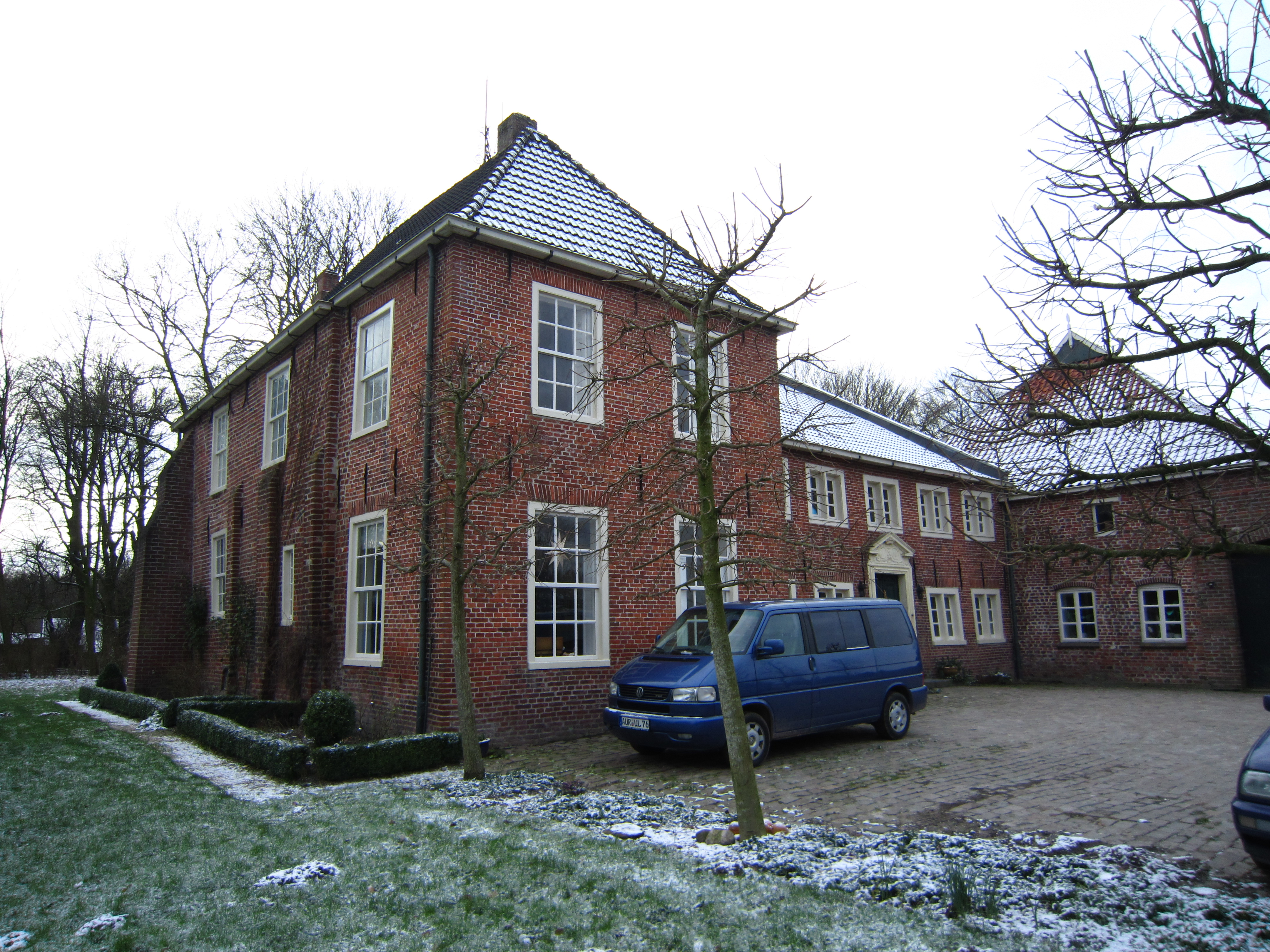 Burg Upgant (Ulferts Börg)